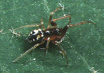 male Anelosimus exiguus from Okinawa.